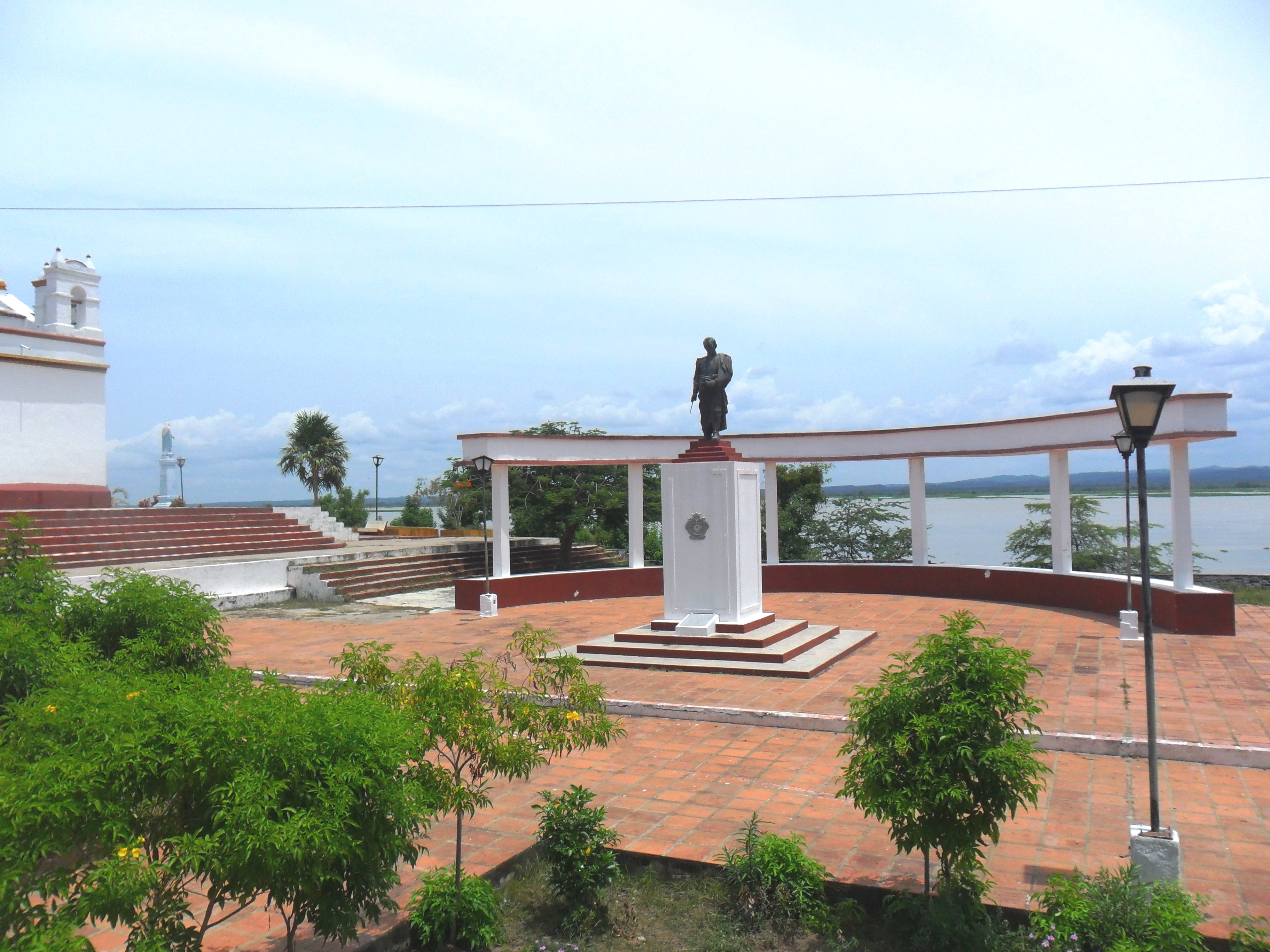 estatua en honor de simon bolivar